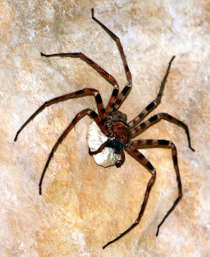 Heteropoda maximaHeteropoda maxima